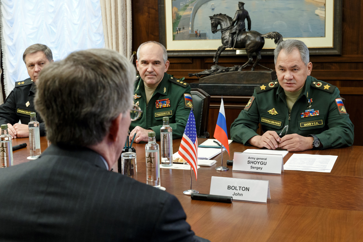 Переговоры министра обороны России генерала армии Сергея Шойгу и советника президента США по национальной безопасности Джона Болтона.